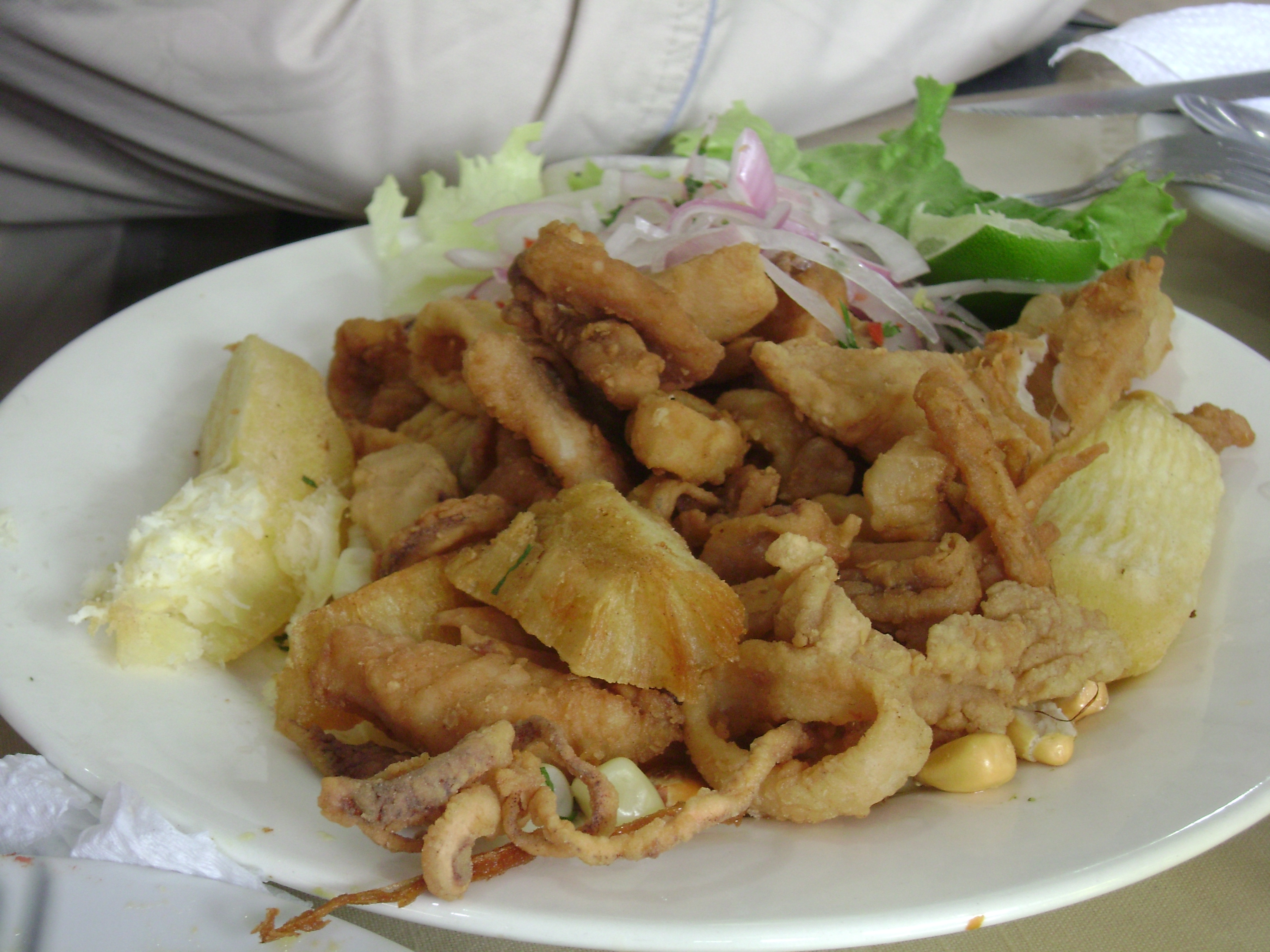 Un plato de chicarrón mixto, preparado en base a pescado y mariscos.